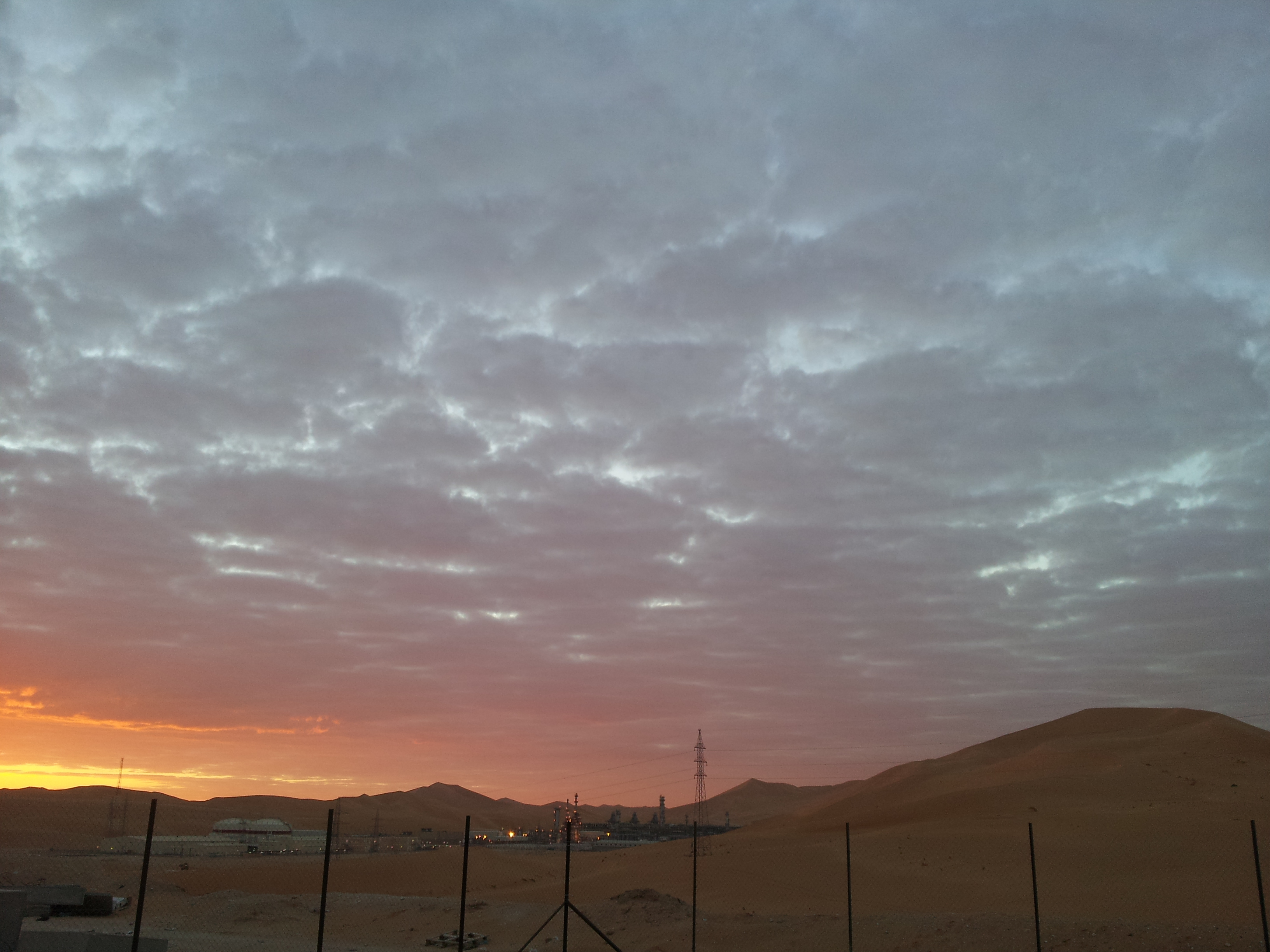 340KM sud est de hassi messaoud